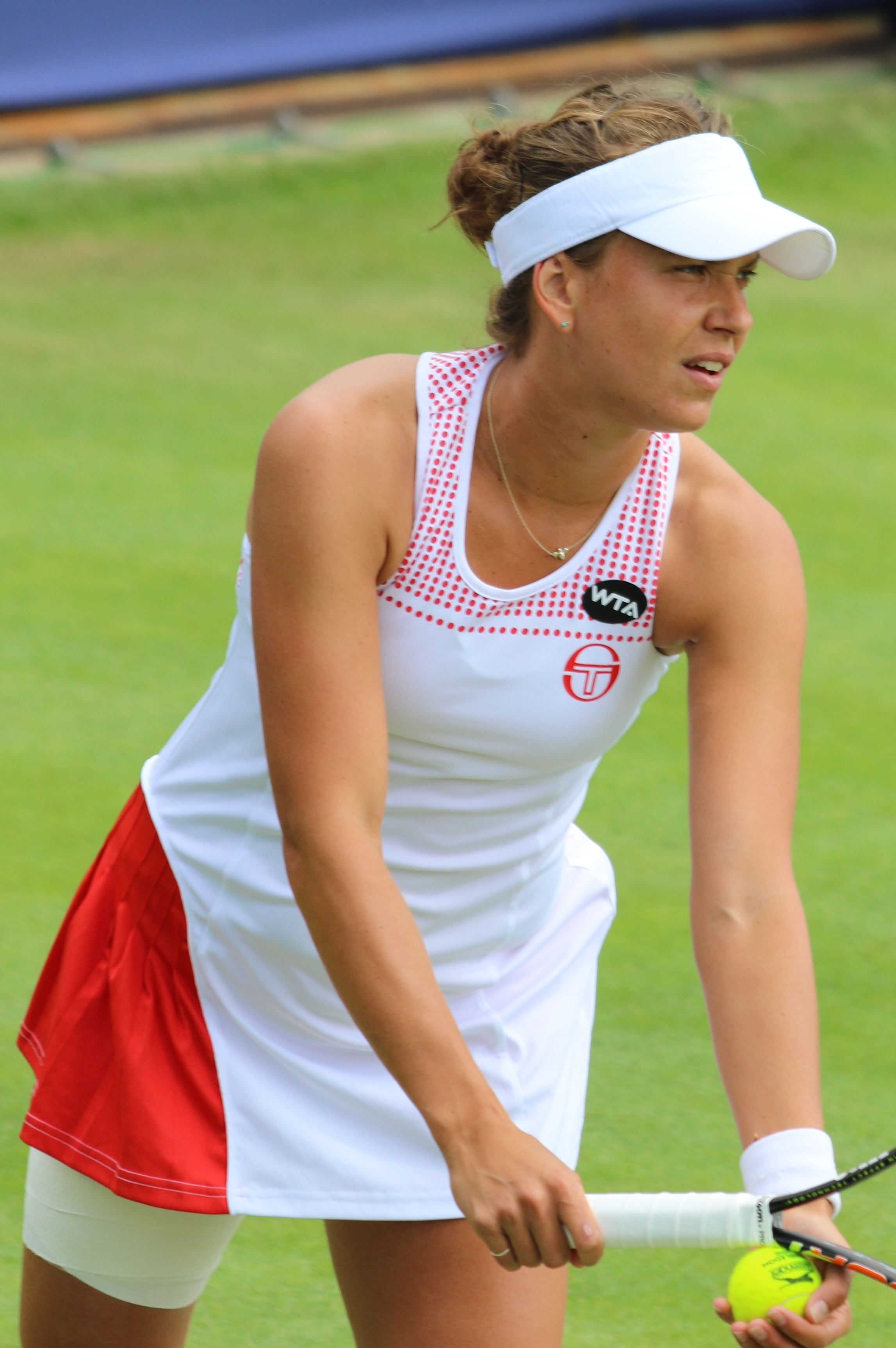 Strycova BM16 (41)